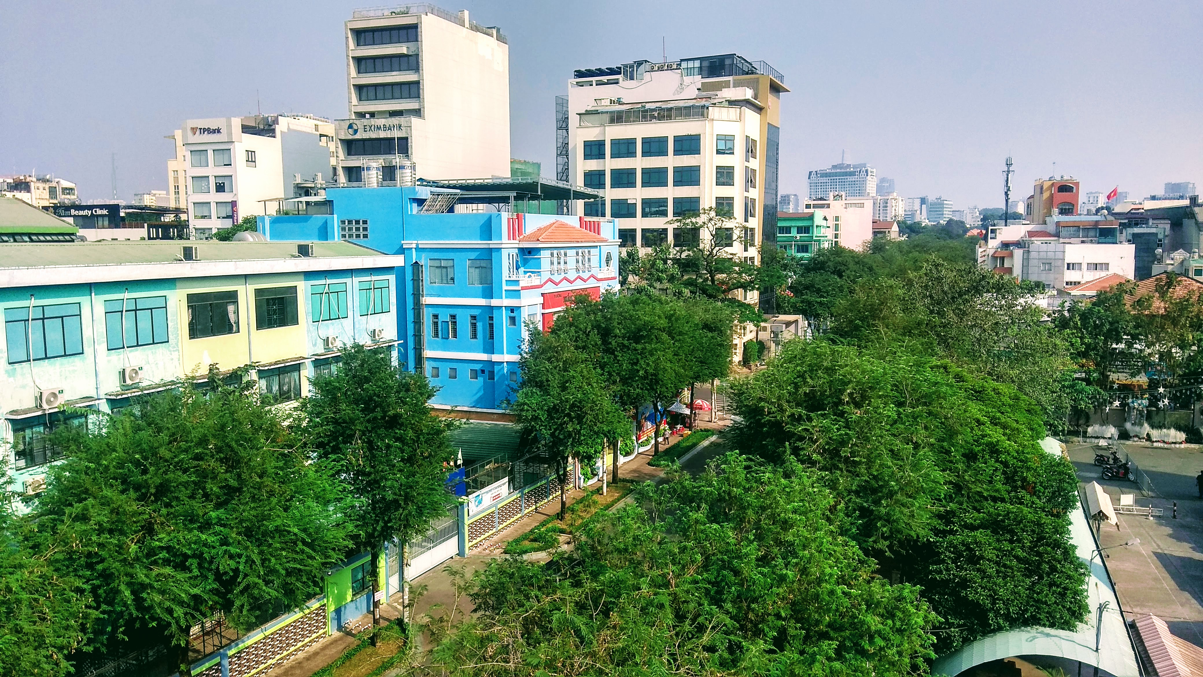 Hình chụp đường Bà Huyện Thanh Quan từ nhà thờ Kỳ Đồng.